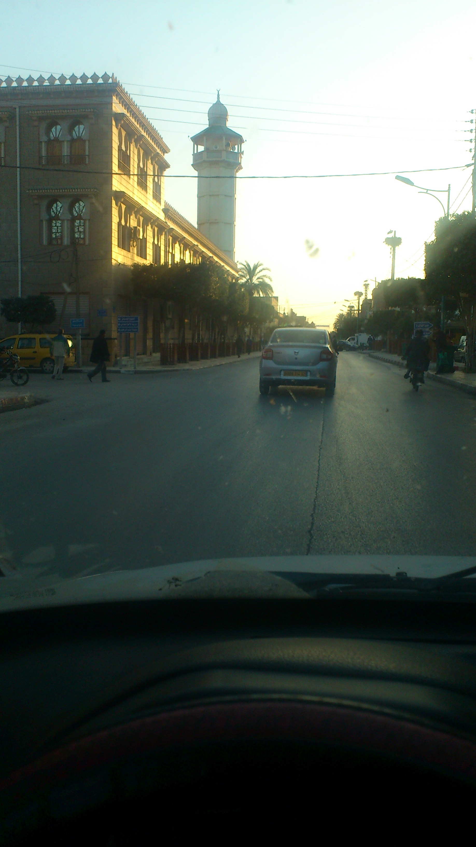 Boukadir centre-ville